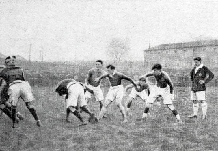 1919 (3 mars), victoire de l'Association sportive bittéroise face au Stade toulousain, éliminé de la Coupe de l'Espérance (3-0) - (le 2 mars pour l'Express du Midi du 3 mars 1919, p.2.